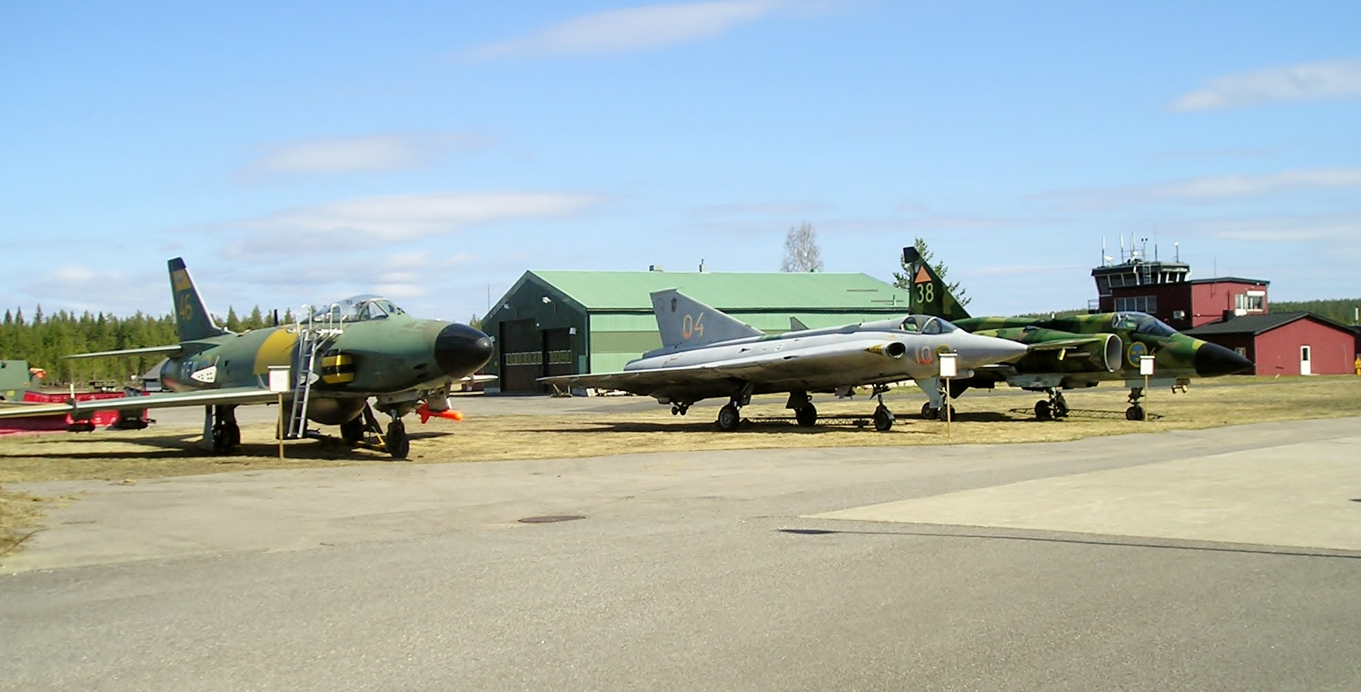 Från vänster: Saab J 32B Lansen, Saab J 35J Draken och Saab JA 37C Viggen vid RFN museum i Vidsel.